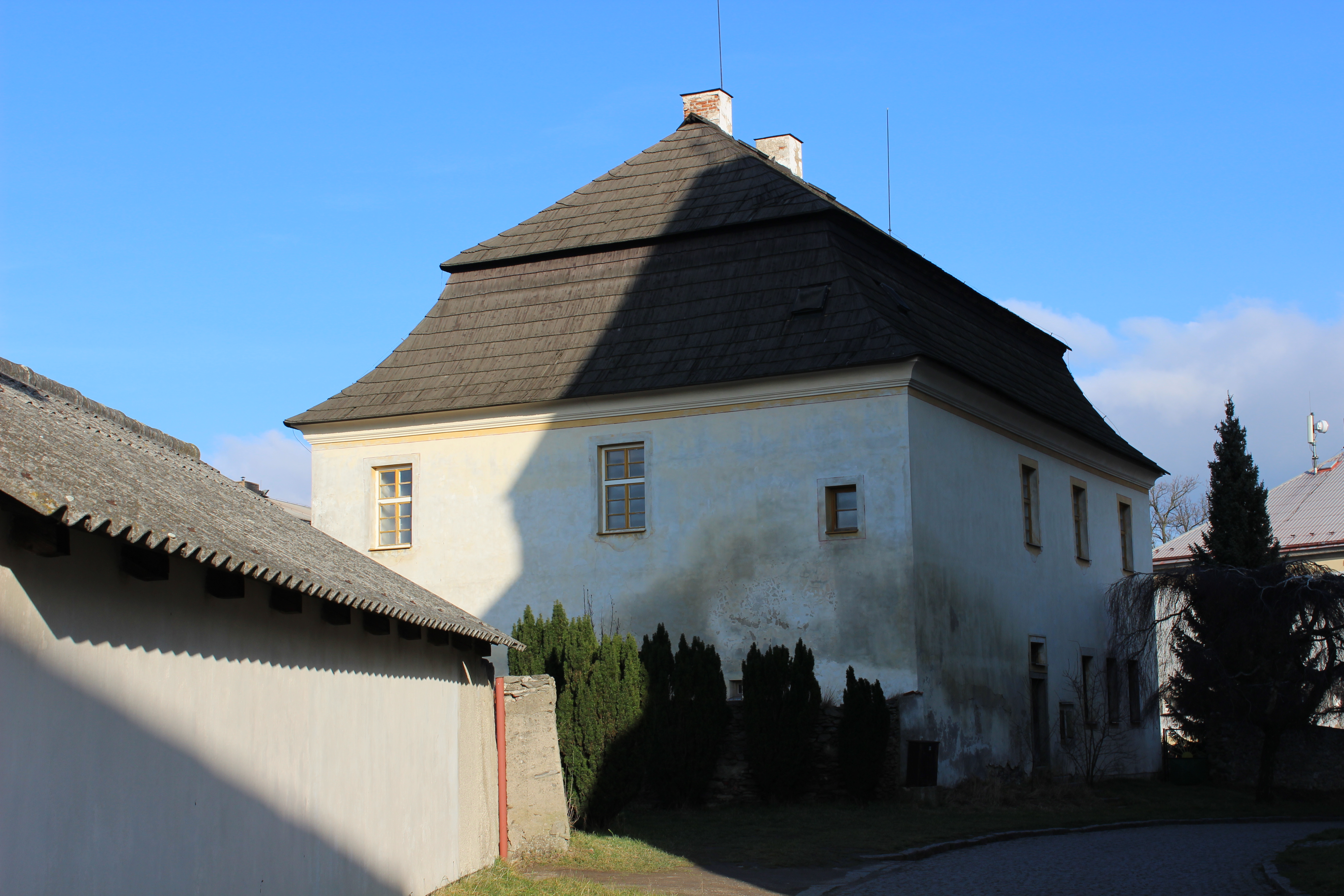 Fara. Miličín je obec v okrese Benešov. Česká republika.